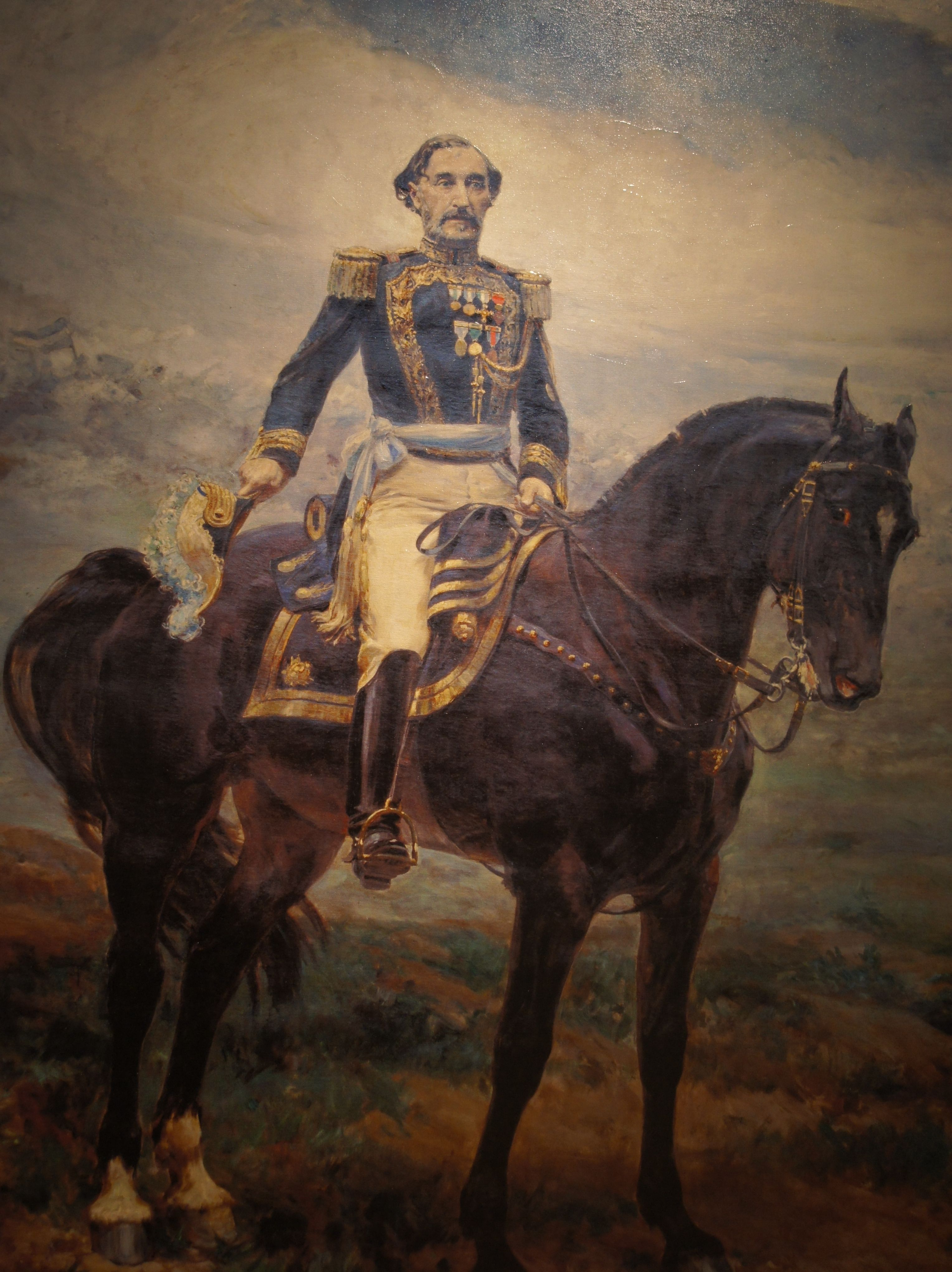 Retato del General Bartolomé Mitre. Reproducción digital obre lienzo. 134 x 100 cm. Ulpiano Checa. 1906. Reproducción del lienzo que Checa pintó por encargo de la familia Mitre en 1906, después del fallecimiento del que fue Presidente de la República Argentina. El retrato original (300 x 248 cm) se encuentra en el Museo Mitre de Buenos Aires (Argentina). Es acaso, el mejor retrato que hizo en América, el único ecuestre y uno de los más importantes de toda su producción. En primer plano representa al general a caballo vestido con el uniforme de gala, y en el fondo, más esbozado, el campo de batalla que, sin referirse a una contienda concreta, hace alusión a sus victorias militares.